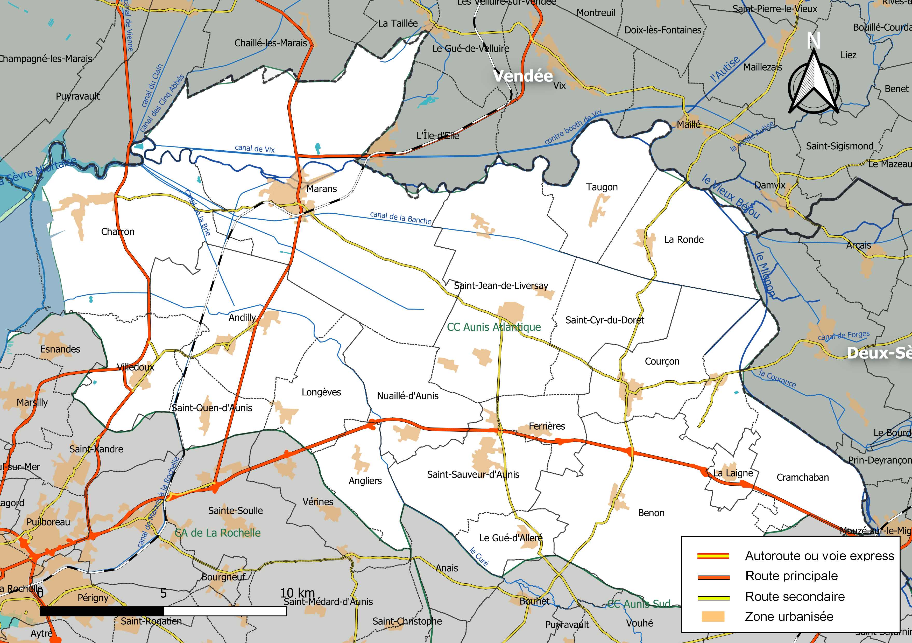 Carte géographique de la Communauté de communes Aunis Atlantique, département de la Charente-Maritime, France. Composition au 1er janvier 2019.